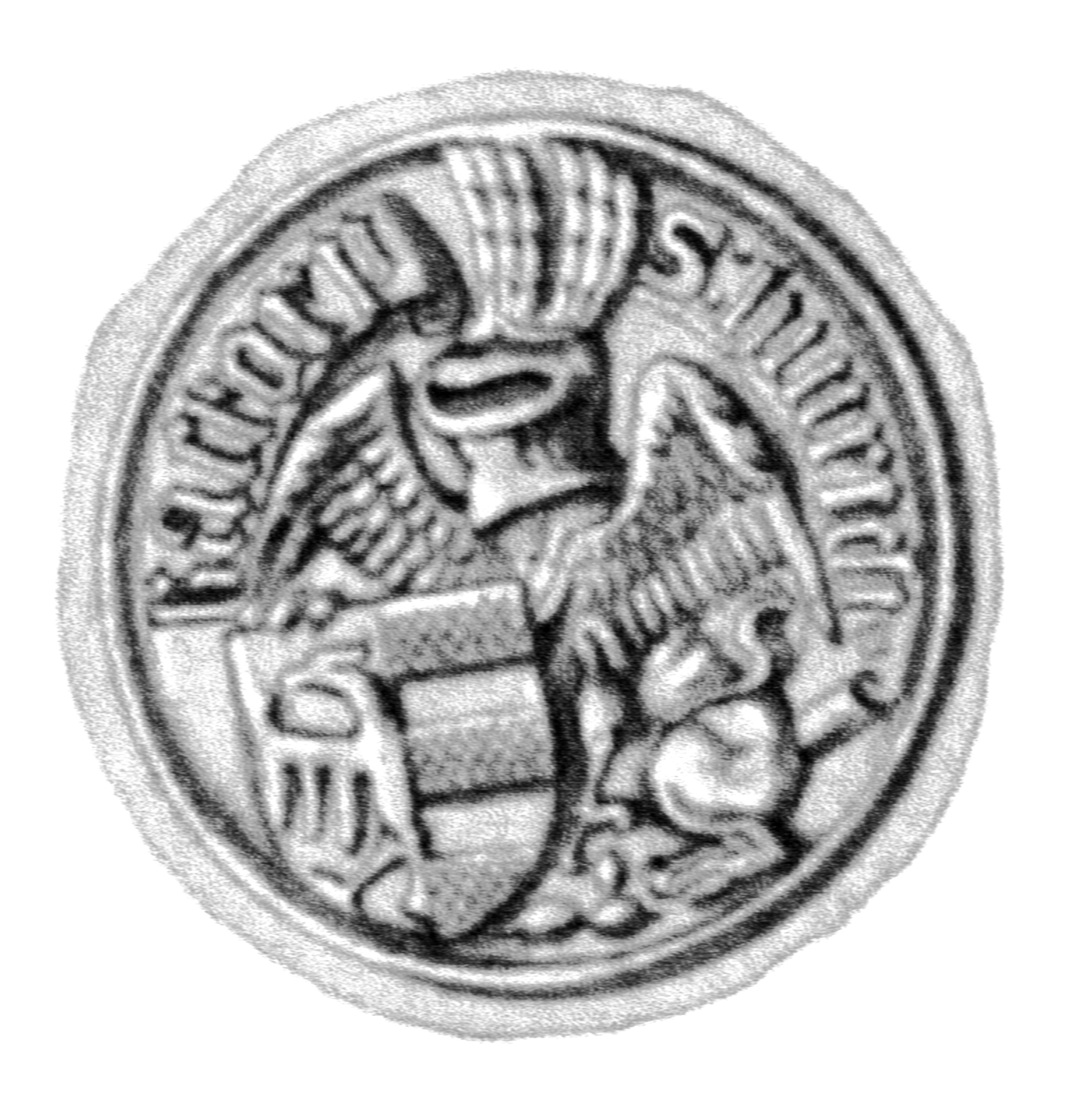 Siegel des Ratsmannes Hinrich Kastorp. Das Siegel stammt aus der Zeit um 1474-1480